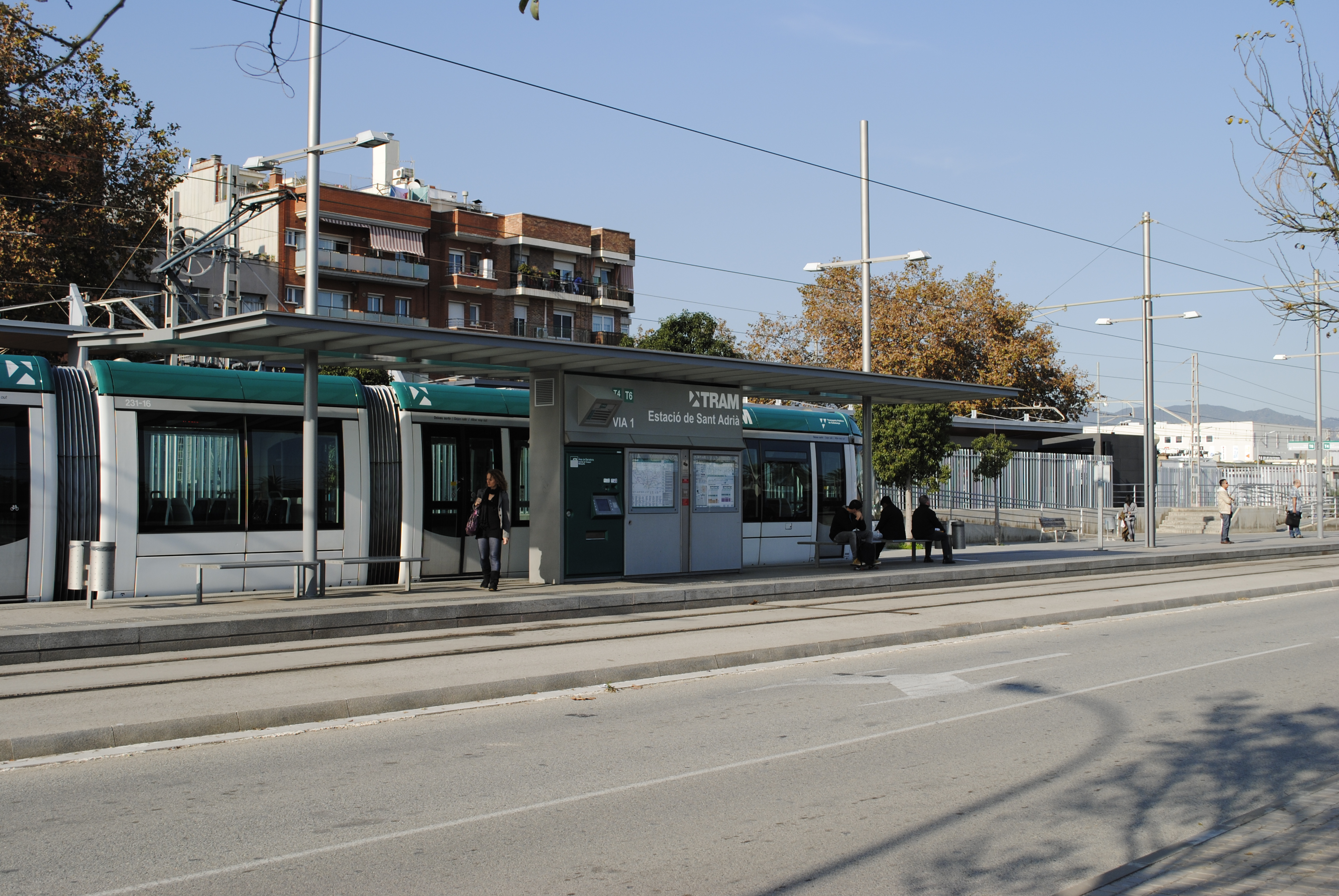 Estació de Trambesòs "Sant Adrià" (Sant Adrià de Besòs)